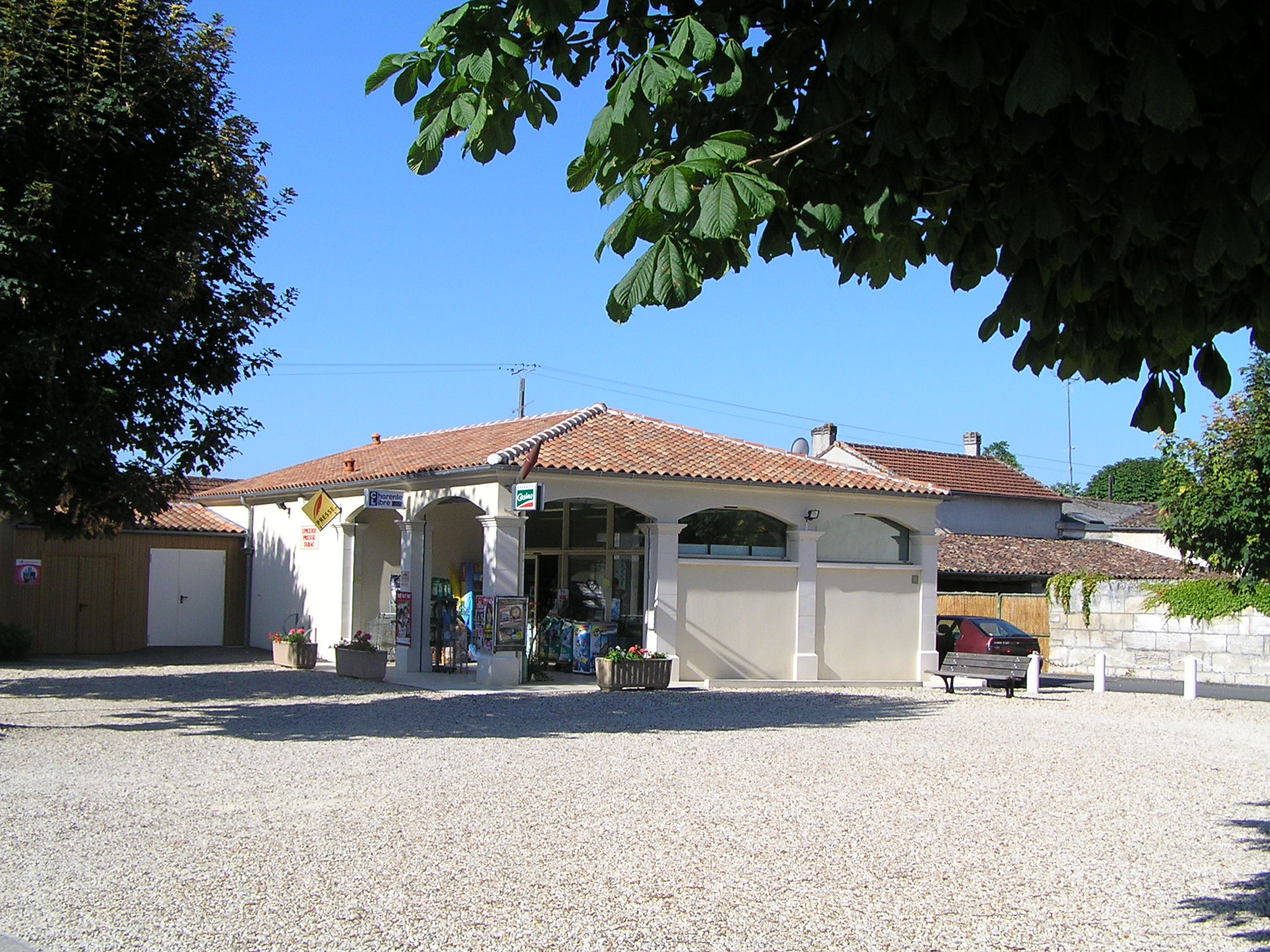 multiple rural de Gondeville (16), France